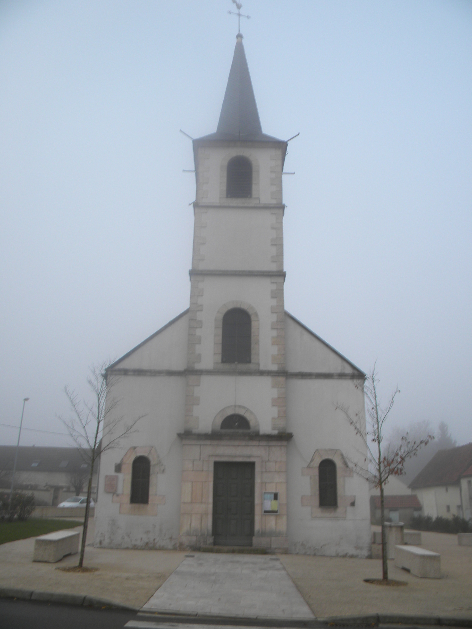 Église saint Nicolas